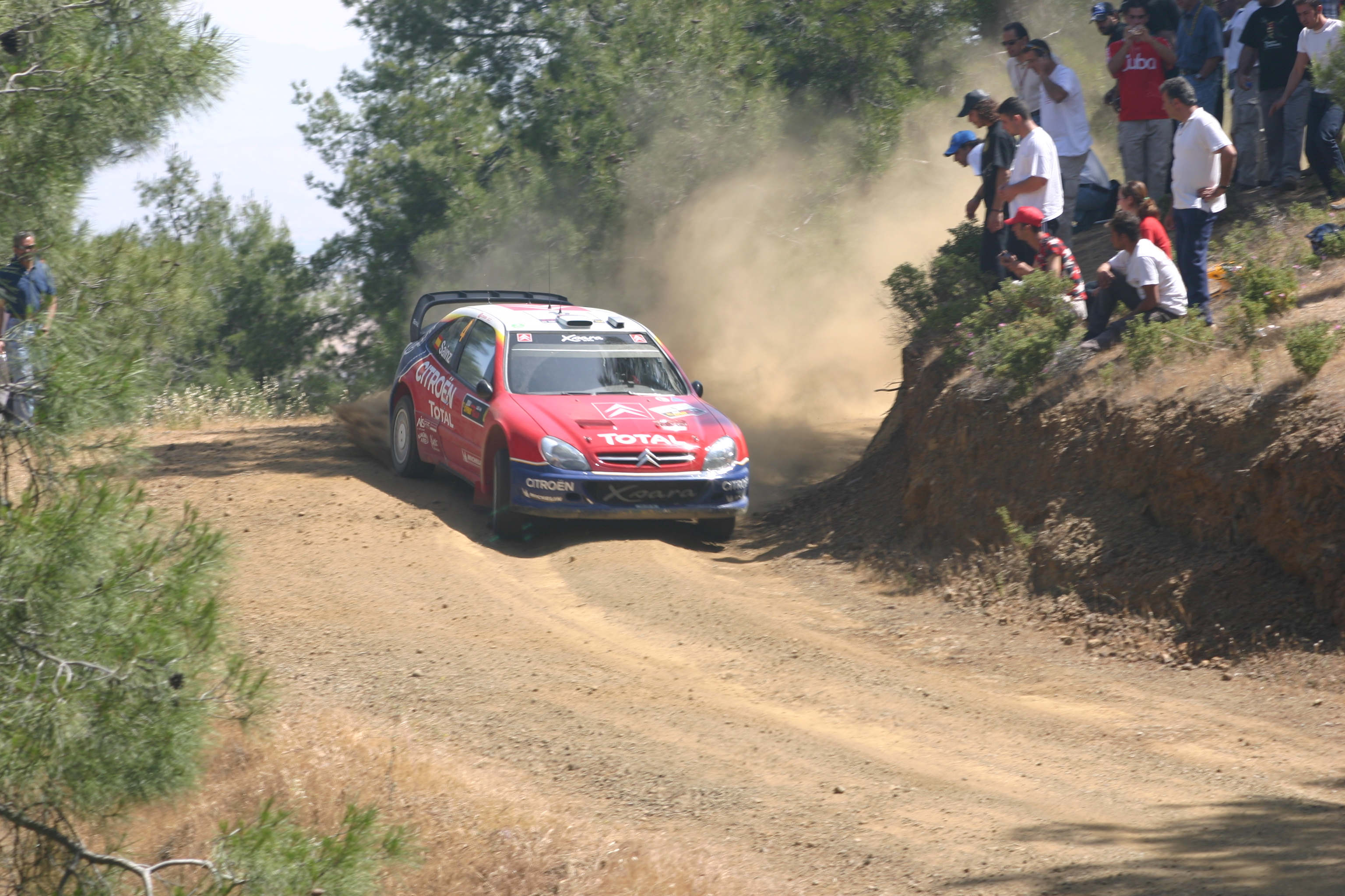 Sainz Chipre 2004